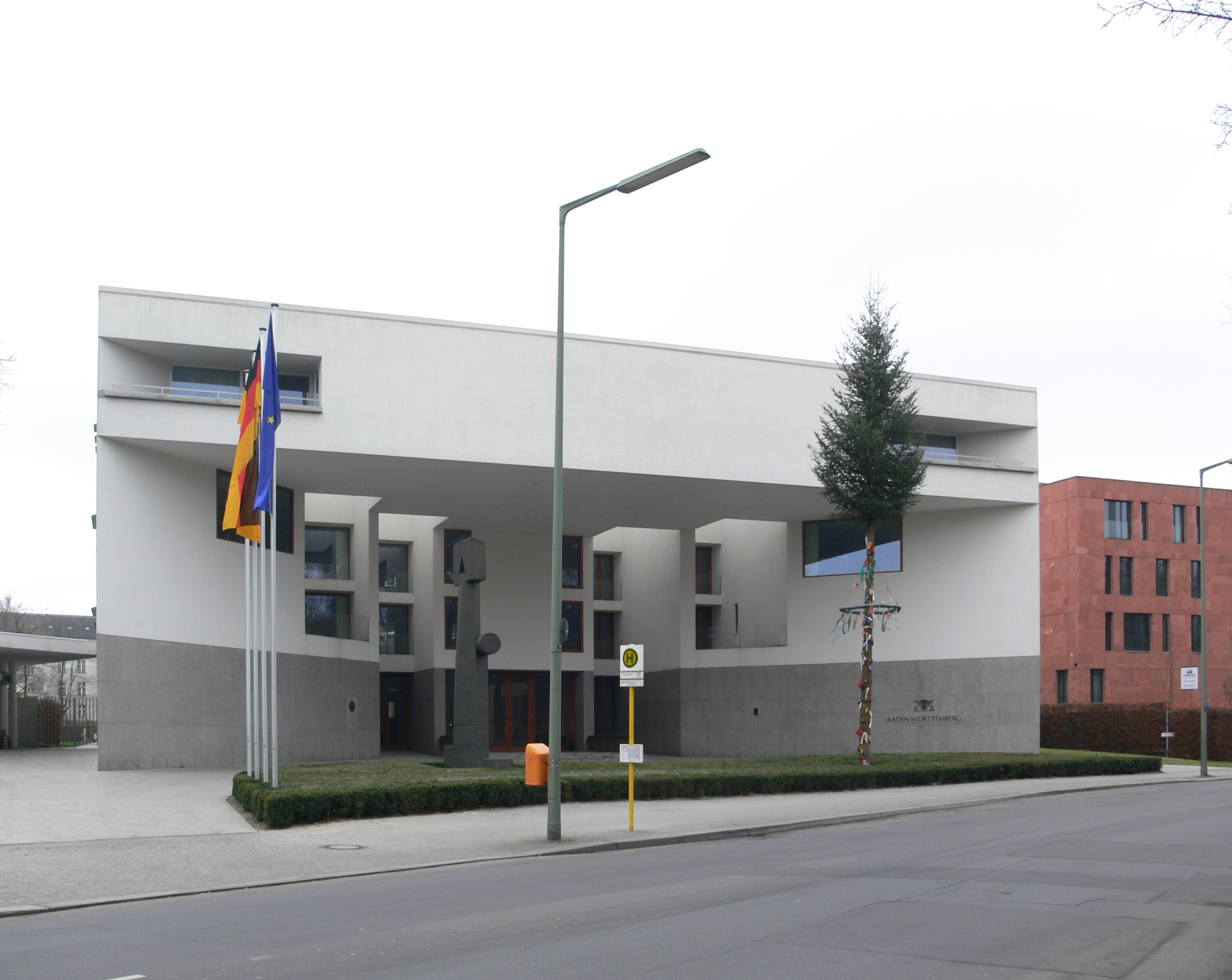 Berlin-Tiergarten, Landesvertretung Baden-Württemberg (mit dem aufgestellten Narrenbaum der Schwäbisch-alemannischen Fastnacht)